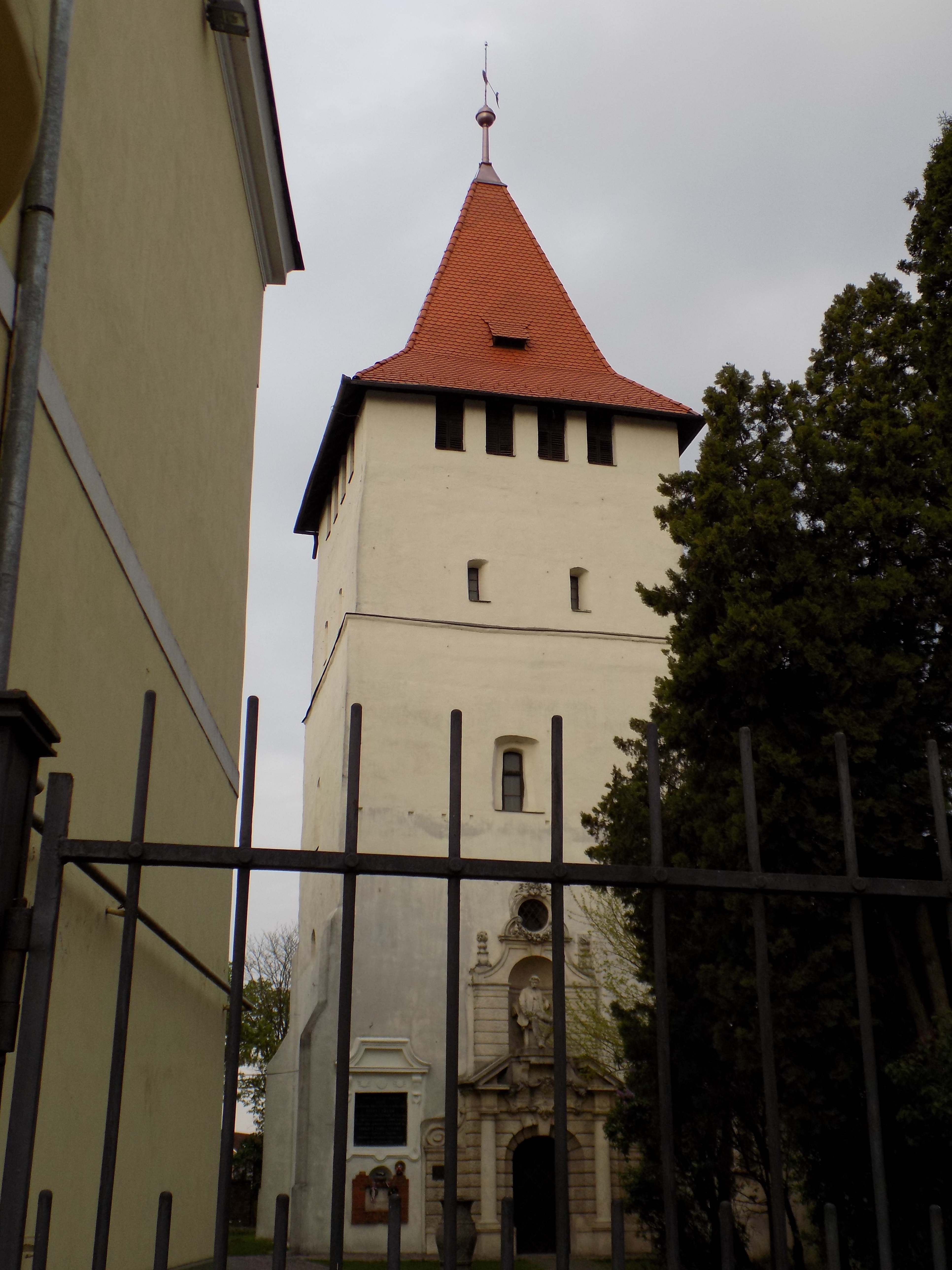 Turm